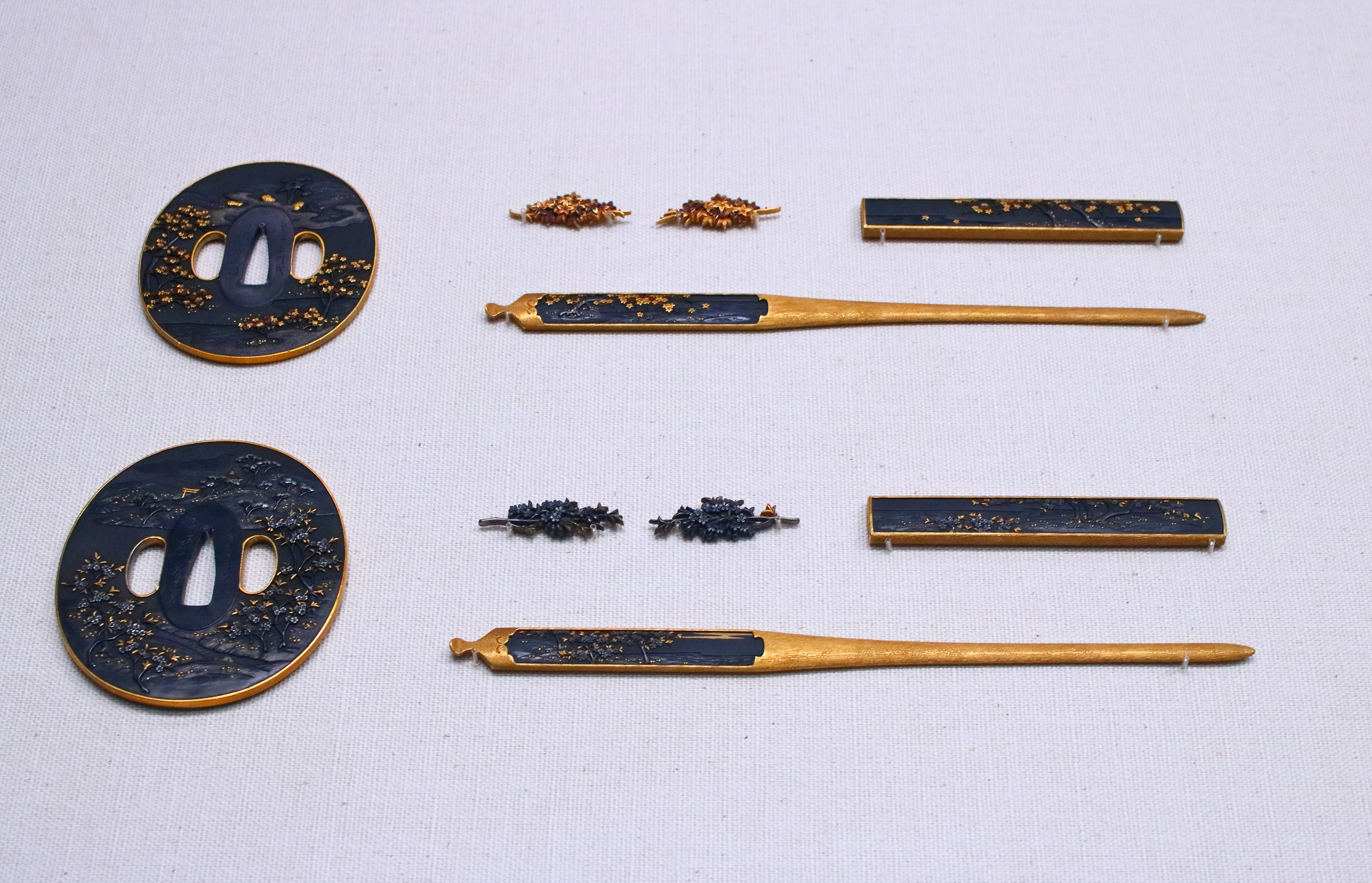 吉野龍田図大小揃金具（重要文化財） - 江戸時代、後藤一乗作。東京都・個人蔵。